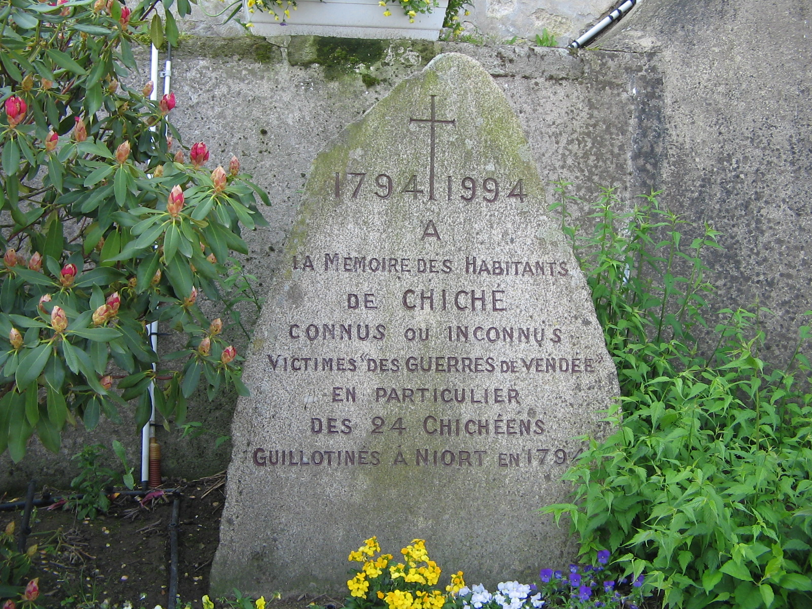 monument guerre de vendée Chiché (79) en avril 2011